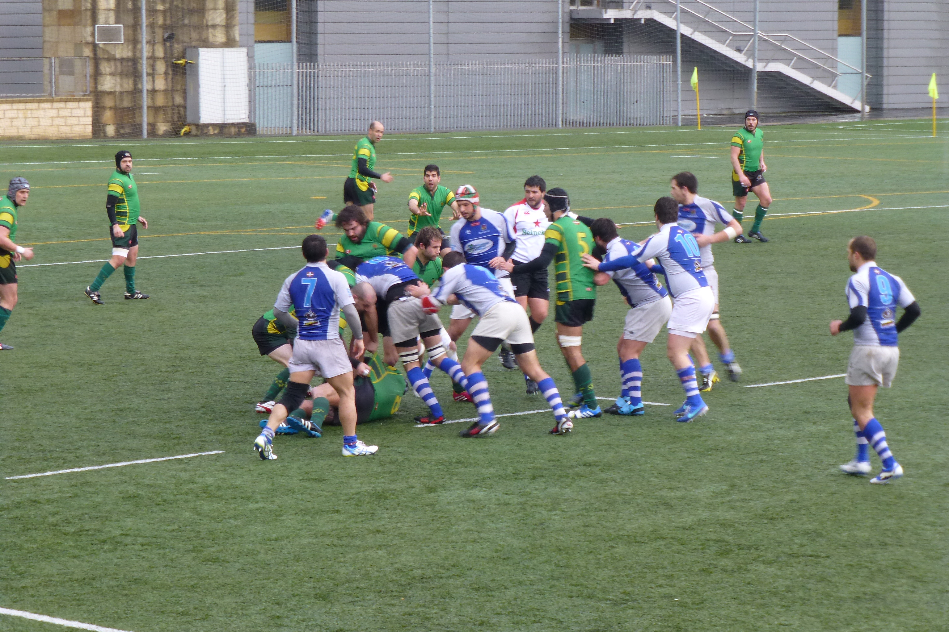 Partido del DRT contra el Uribaldea Rugby Taldea División de Honor B de la liga española. Jugado en Arripozueta de Durango el 15 de marzo de 2015.